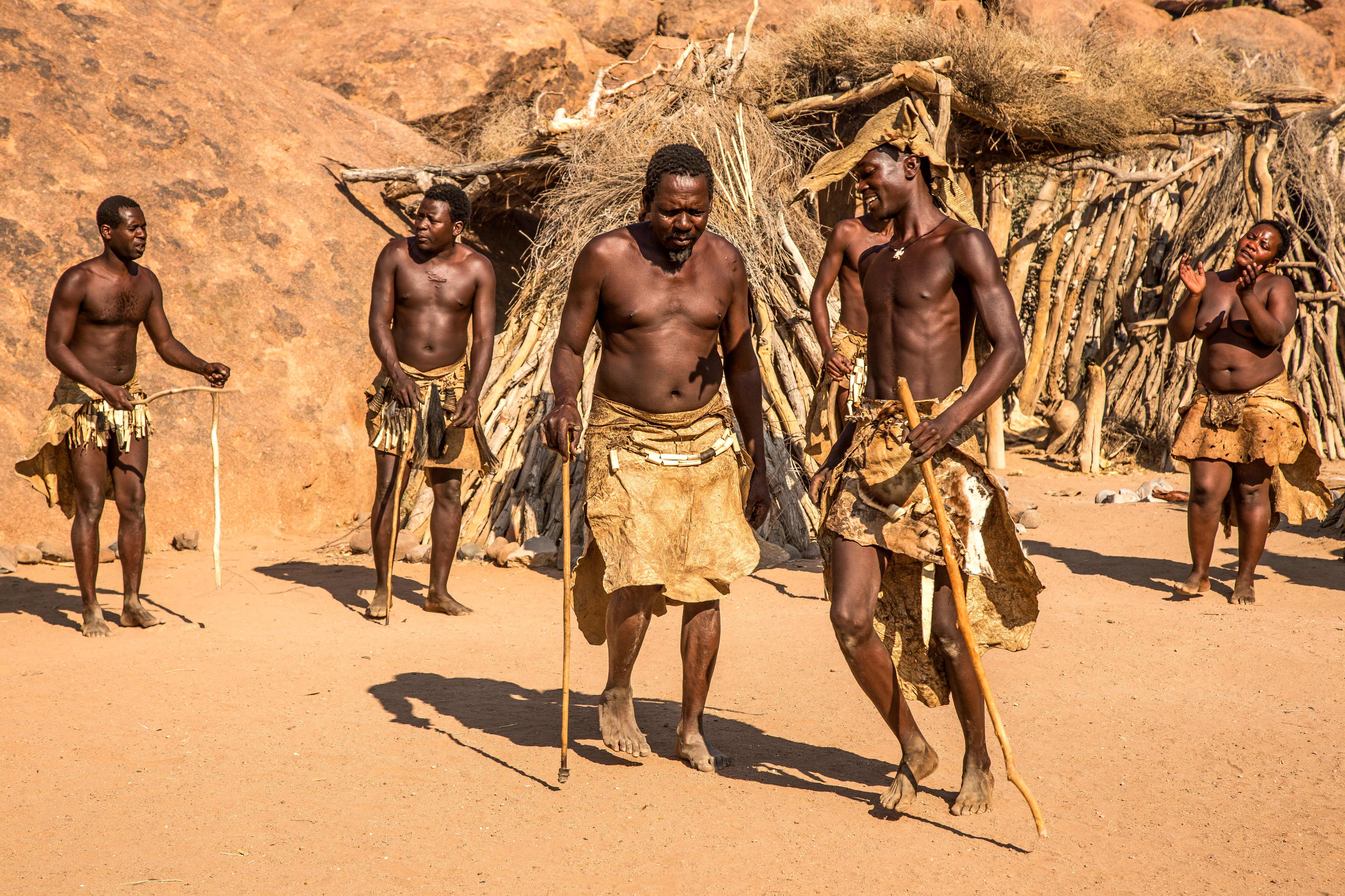 Mann der Damara